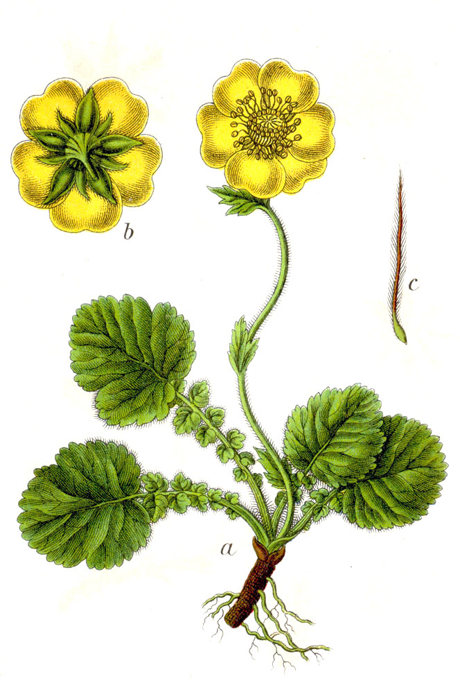 Parageum montanum HARA, syn. Geum montanum L. Original Caption Berg-Nelkenwurz, Geum montanum